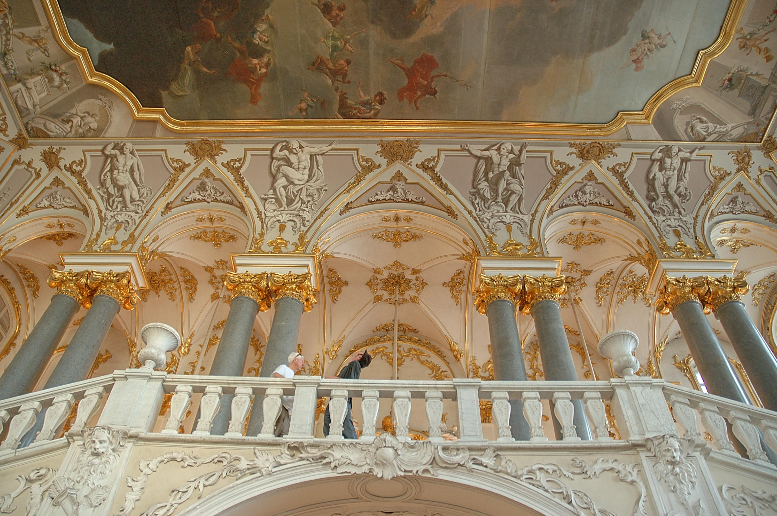 St. Petersburg Hermitage